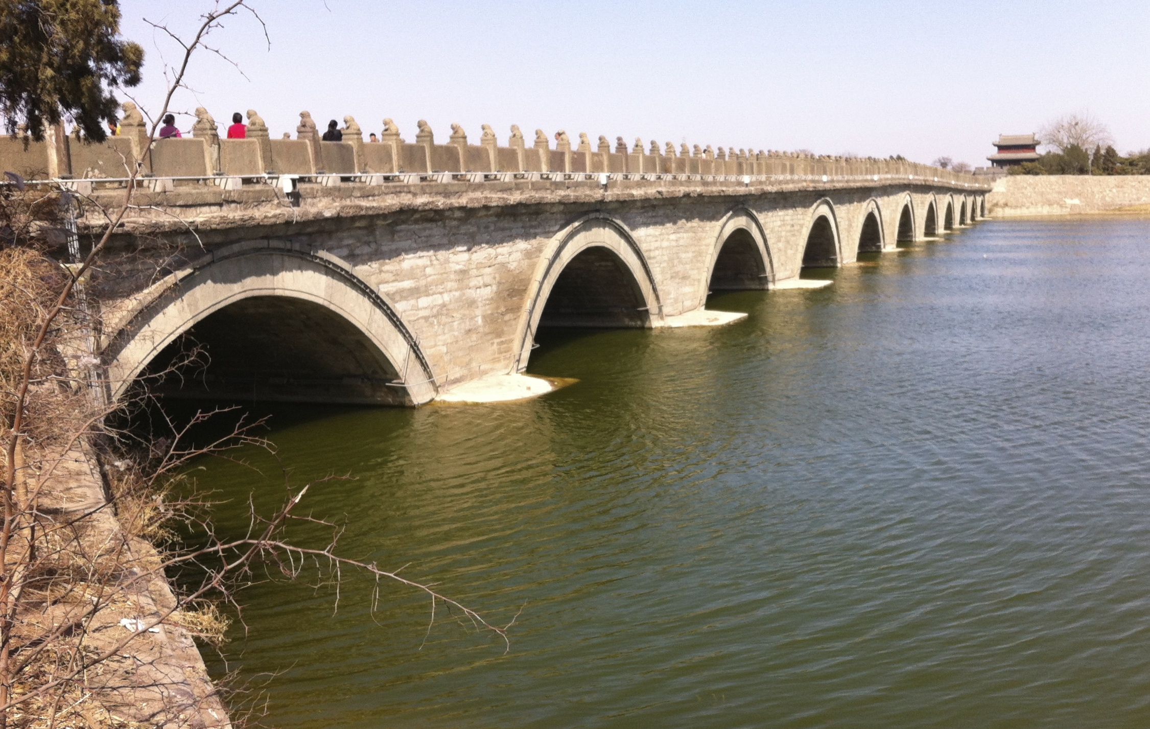 Marco Polo-brons sydsida av västra landfästet